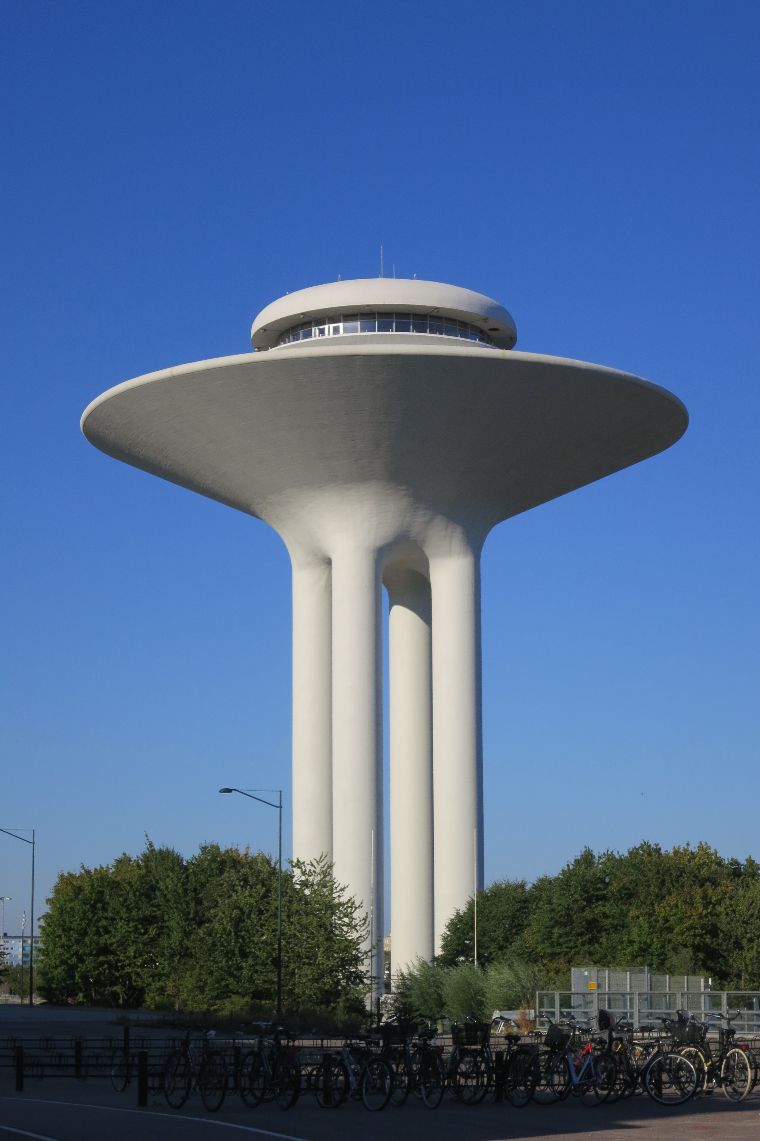 Hyllie vattentorn i september 2013